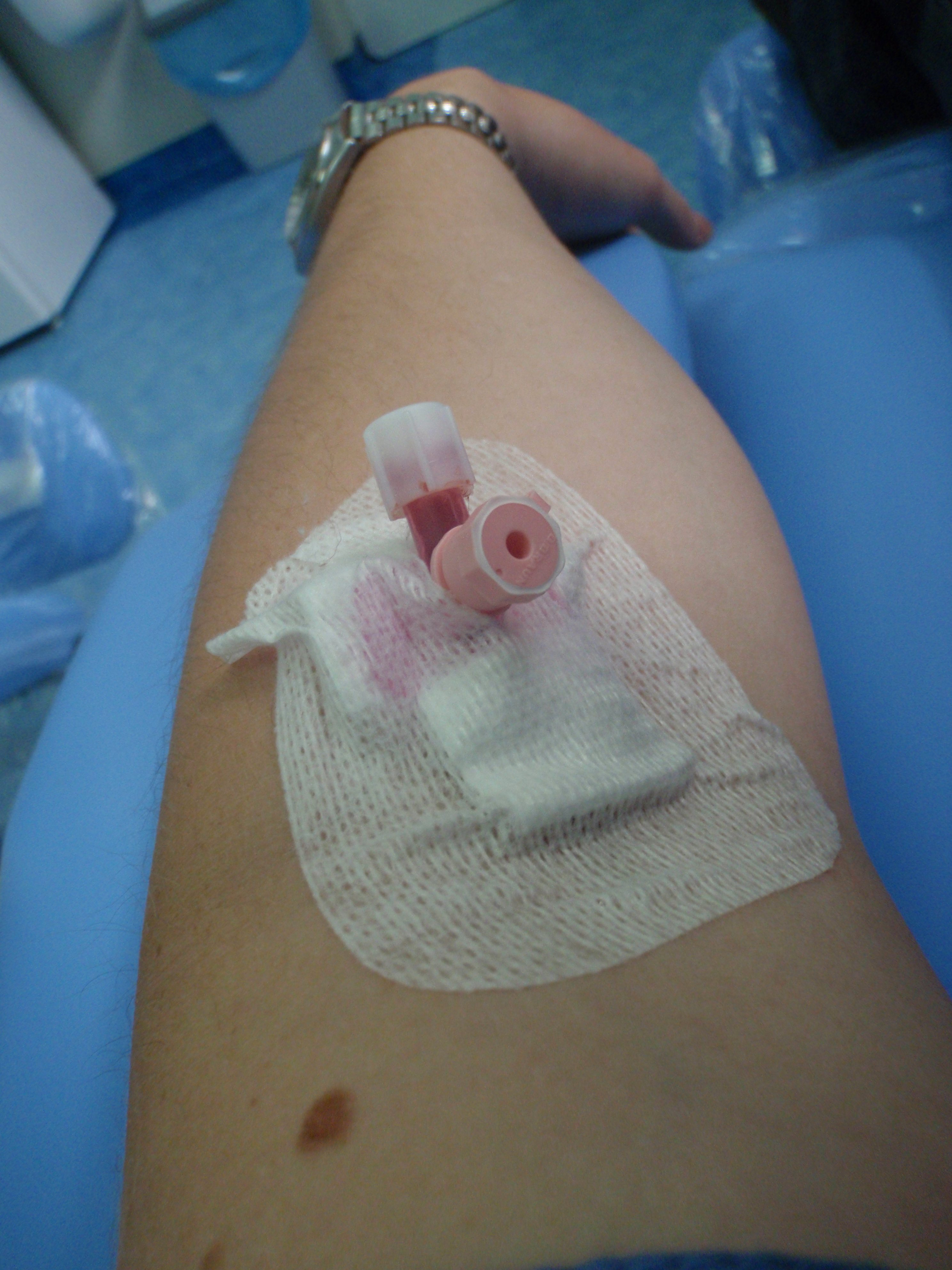 Wenflon założony w lewej rece chorego, koło przegubu łokciowego